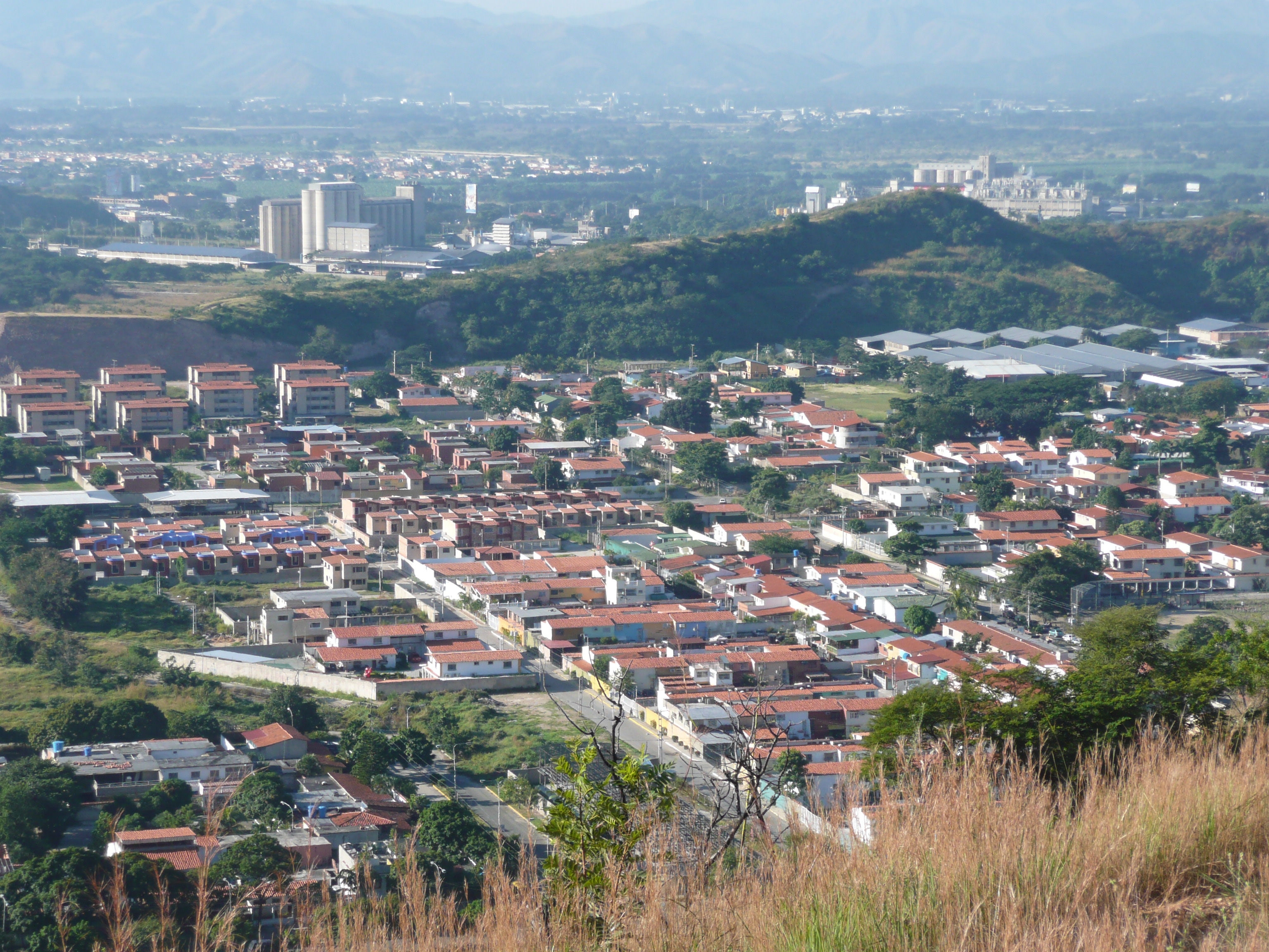 Lugar / Place / Lieu : Near Turmero, Aragua, Venezuela.